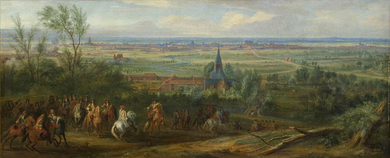 Siege of Lille (August 1667)